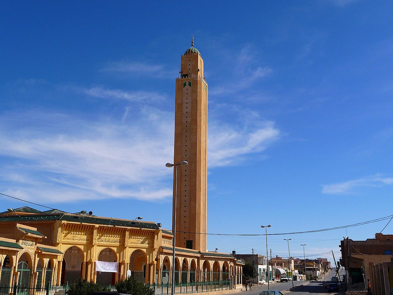 Jadu,Mosque